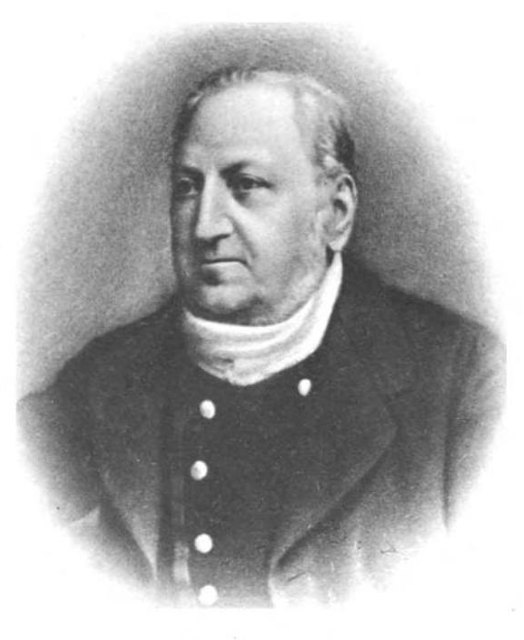 Andreas Ludwig Jeitteles. Gesammelte Dichtungen, Prag 1899